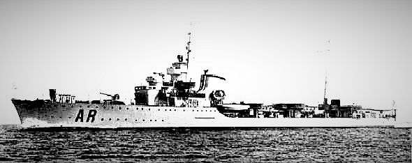 The destroyer Artigliere (AR)